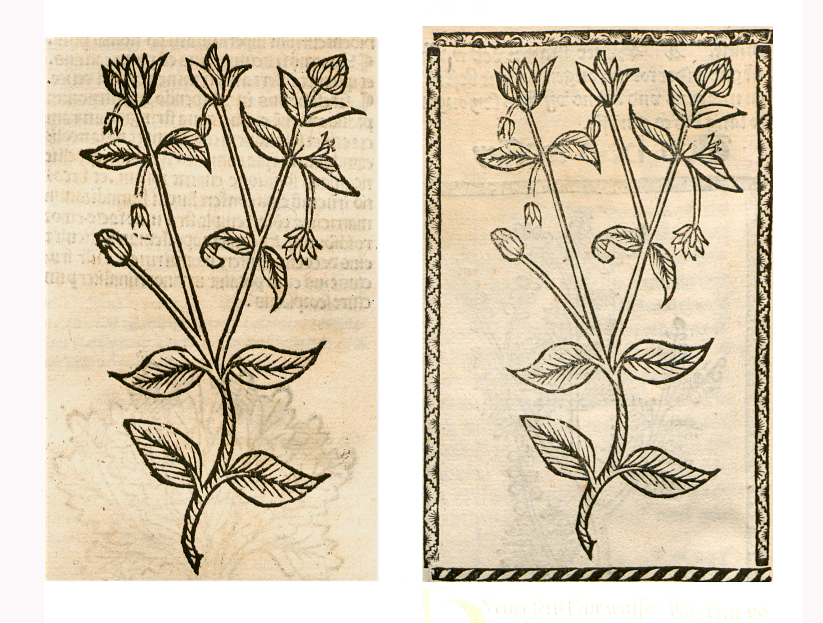 Abbildung von: Hüner Serb (Stellaria media)